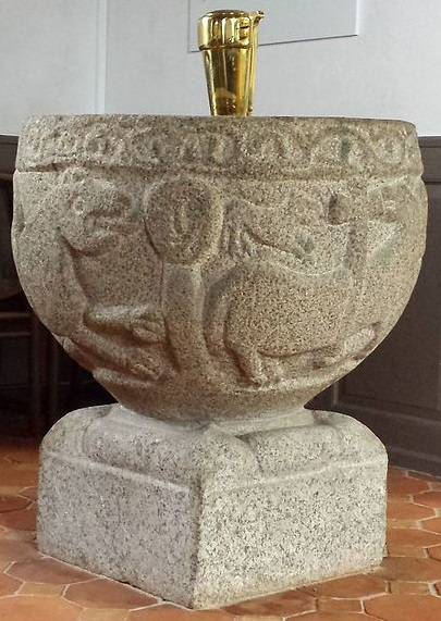 Døbefonten i Essenbæk Kirke.